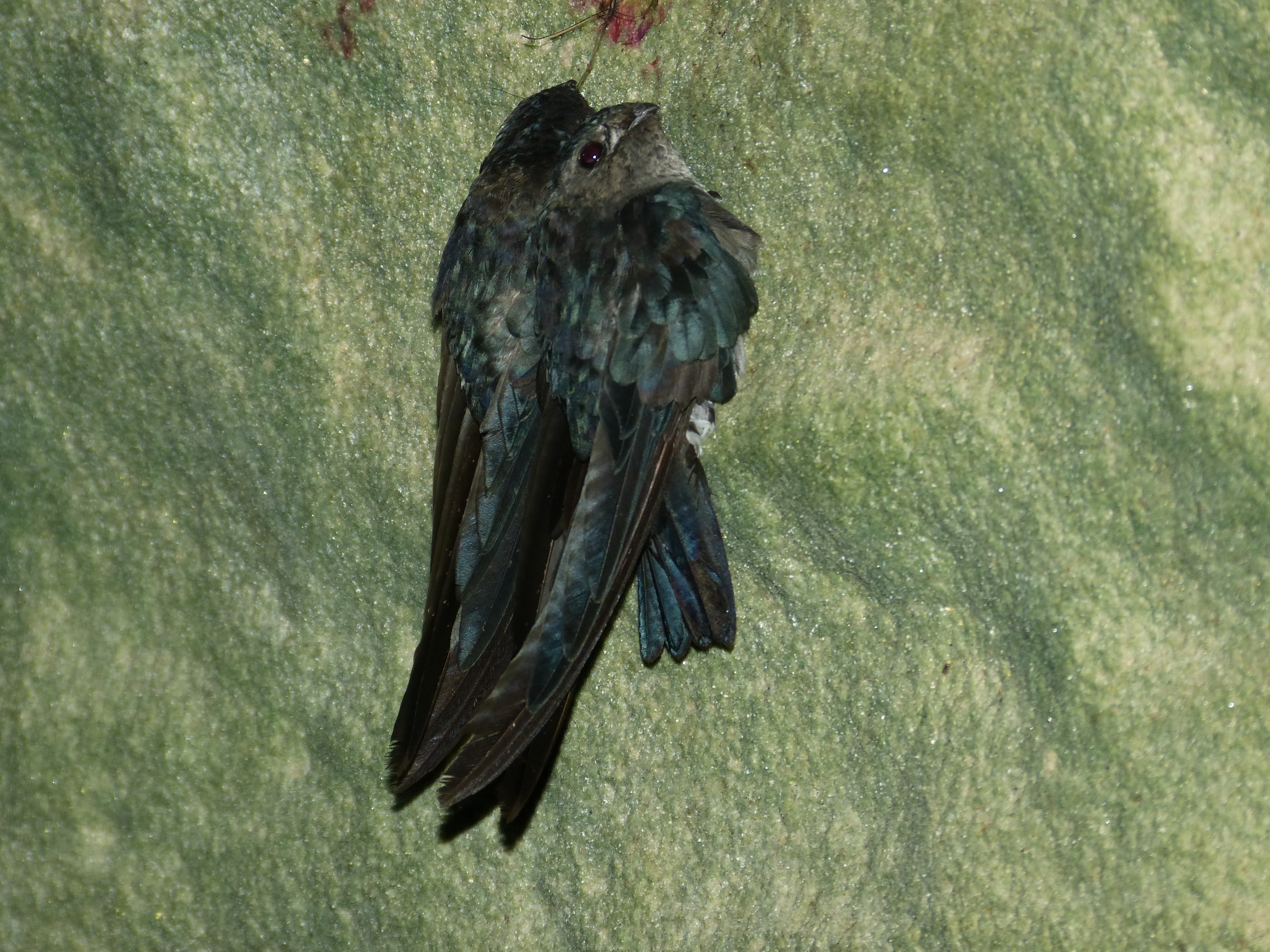 Bako NP, Sarawak, MALAYSIA